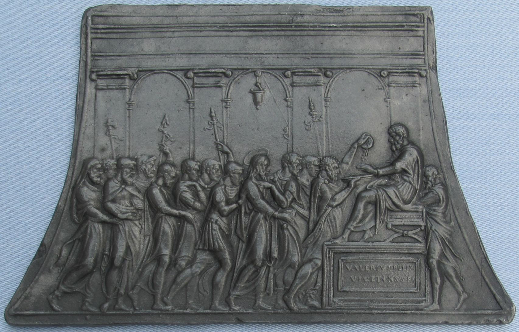 Valerio vicentino, cristo davanti a pilato, 1532